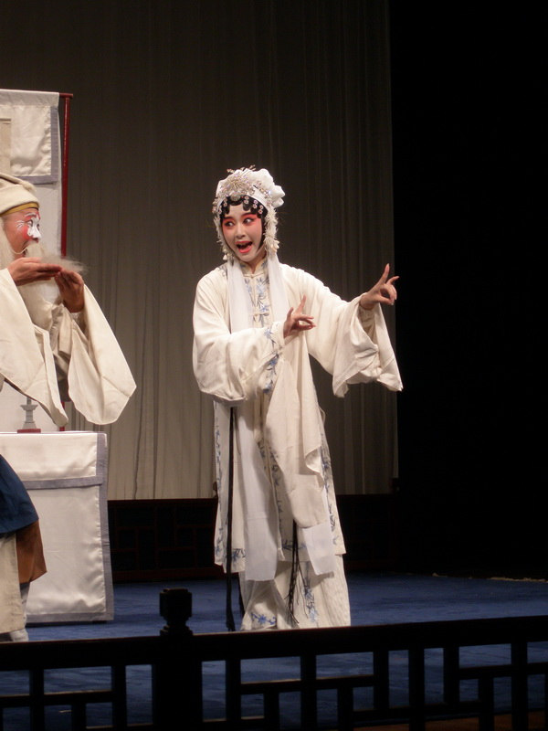 中国昆曲演员单雯演出昆剧蝴蝶梦